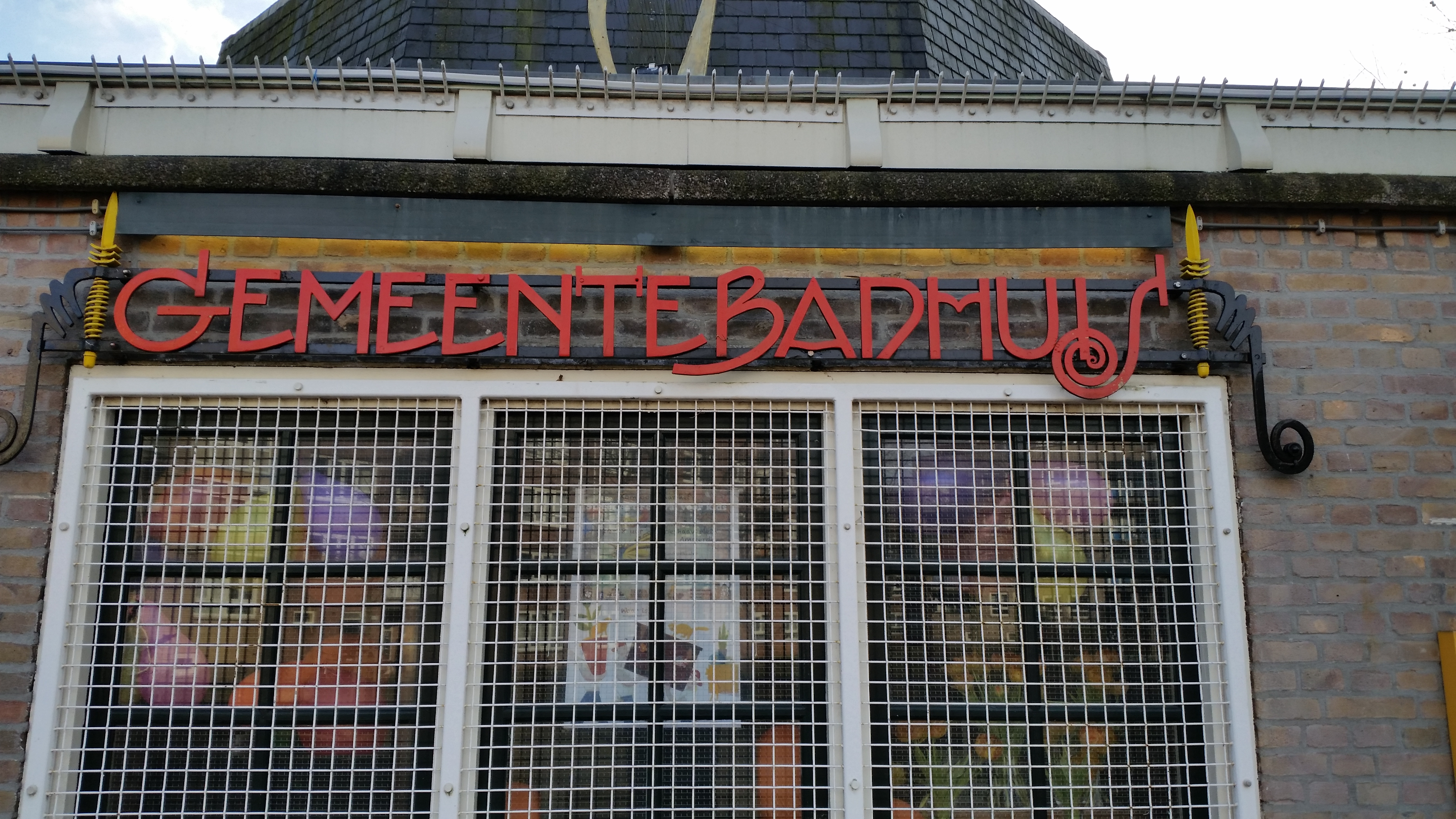 Impressie Boerhaaveplein 28, Amsterdam (februari 2020)